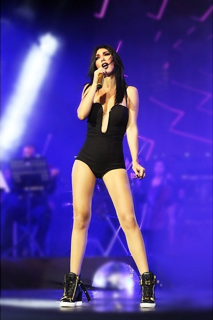 Hande Yener, Harbiye Cemil Topuzlu Açıkhava Tiyatrosu'nda sahnede.